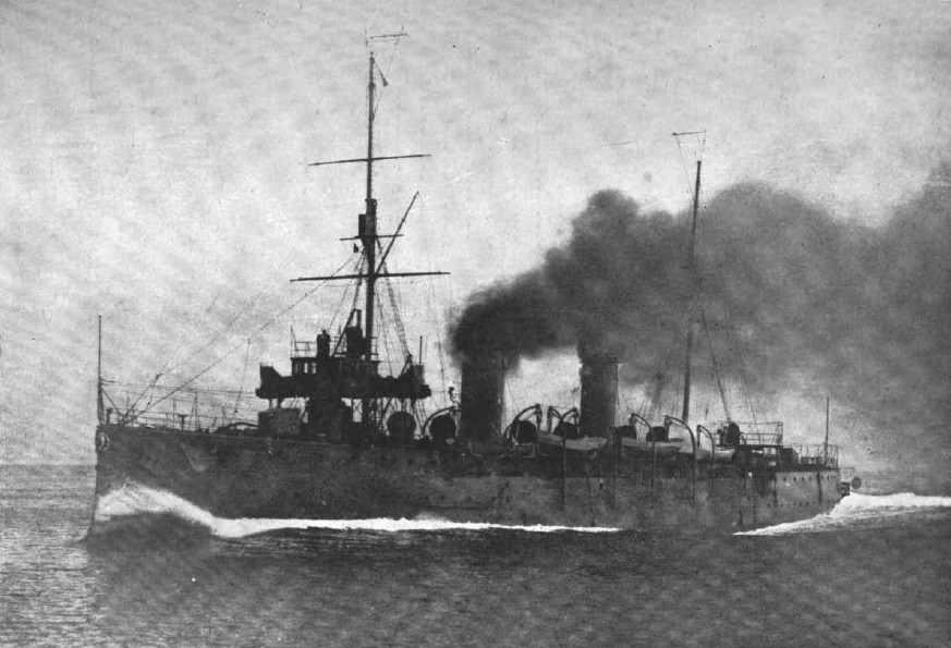 Crucero explorador B.A.P. Almirante Grau 1º.